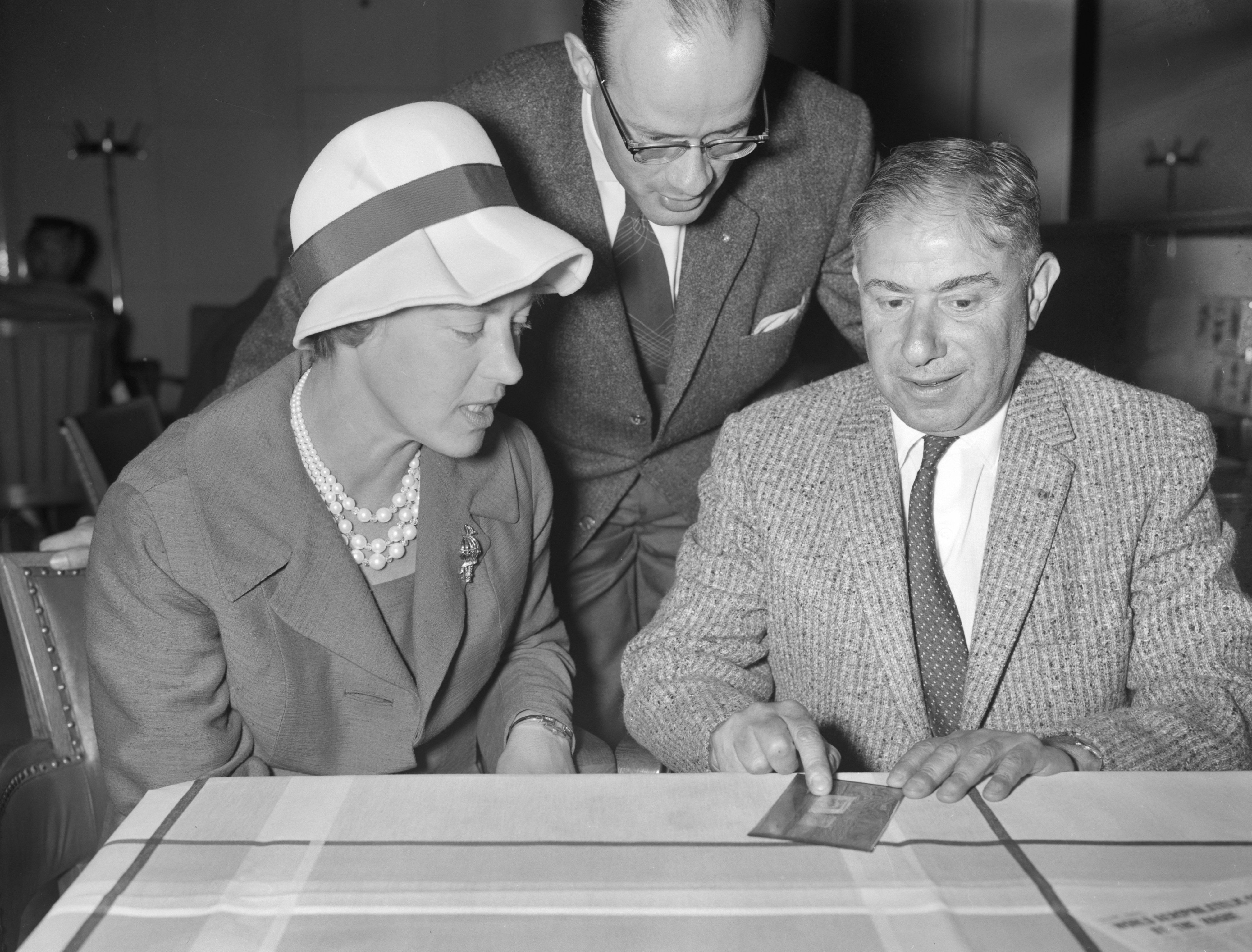 Collectie / Archief : Fotocollectie Anefo Reportage / Serie : [ onbekend ] Beschrijving : Zeven miljoen gulden aan postzegels op Schiphol. Mevrouw Boesman , Jhr. Six en Goodkind Datum : 3 augustus 1961 Locatie : Noord-Holland, Schiphol Trefwoorden : POSTZEGELS Persoonsnaam : Jhr. Six Fotograaf : Bilsen, Joop van / Anefo Auteursrechthebbende : Nationaal Archief Materiaalsoort : Negatief (zwart/wit) Nummer archiefinventaris : bekijk toegang 2.24.01.04 Bestanddeelnummer : 912-8027 Reacties Geplaatst door Maaike op 28 maart 2014 - 18:49. Persoonsnamen: Henry M. Goodkind; M.W. Six